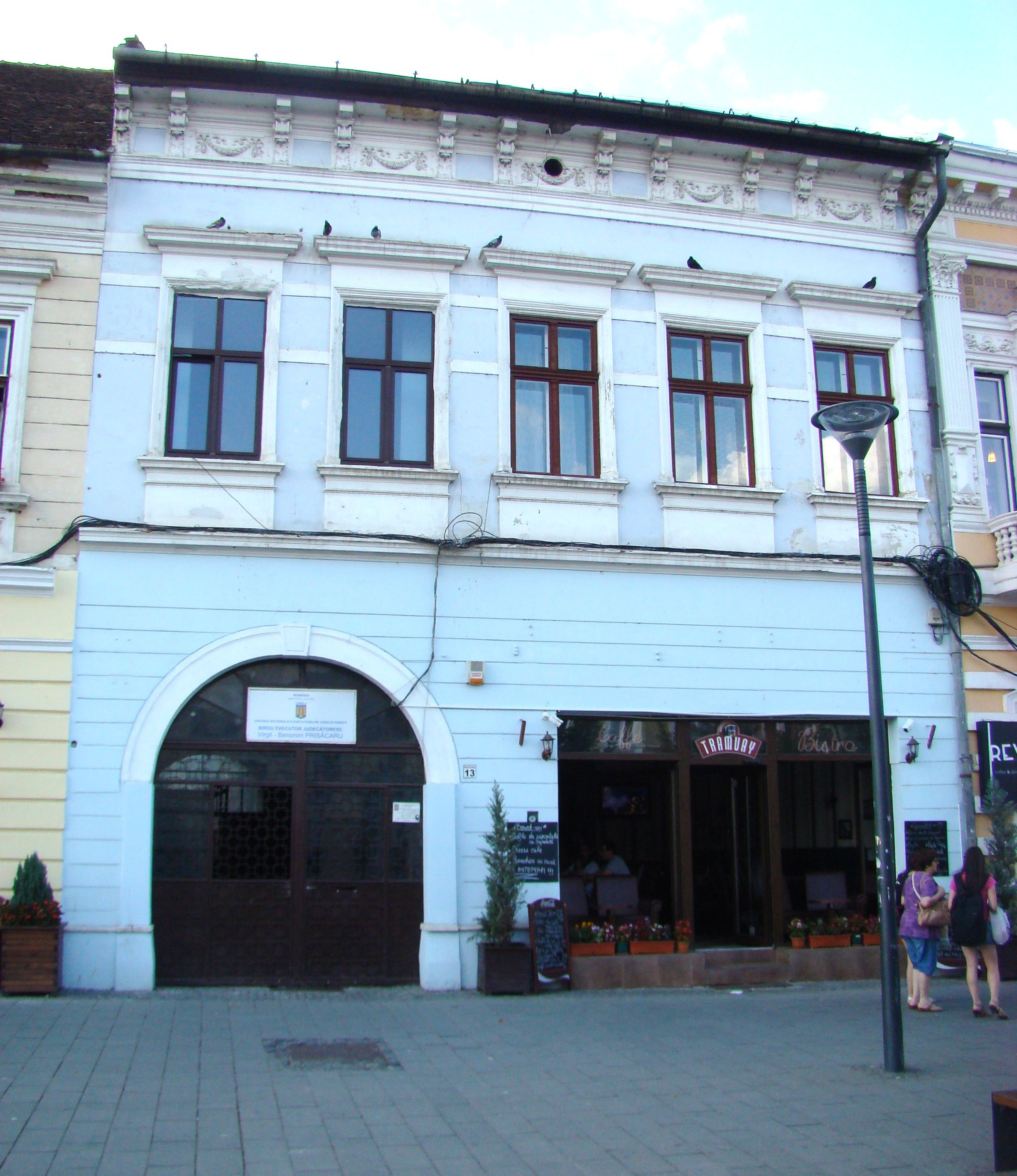 Clădire monument istoric, Bd.Eroilor, nr. 13